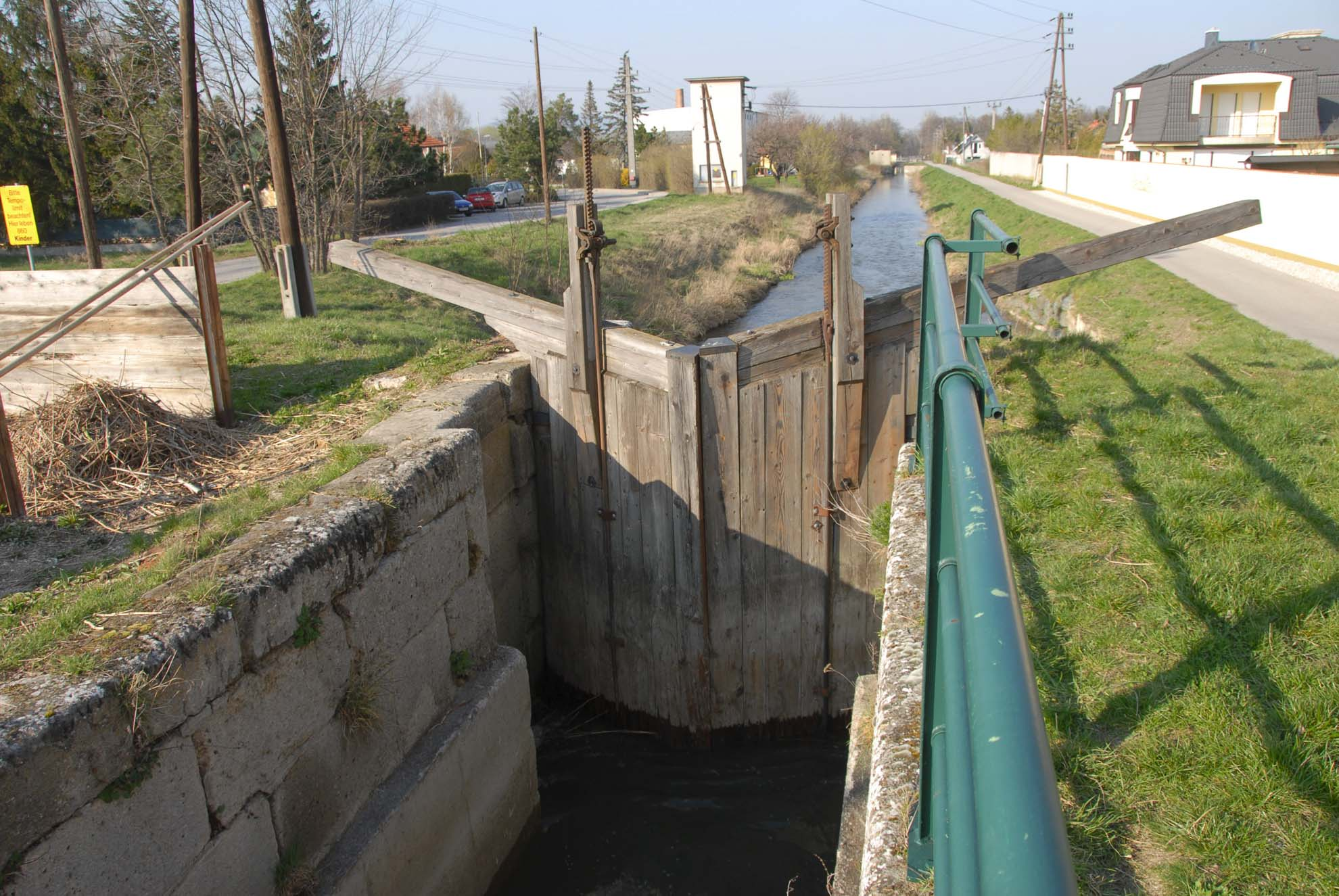 Das einzige restaurierte Schleusentor bei Kottingbrunn.